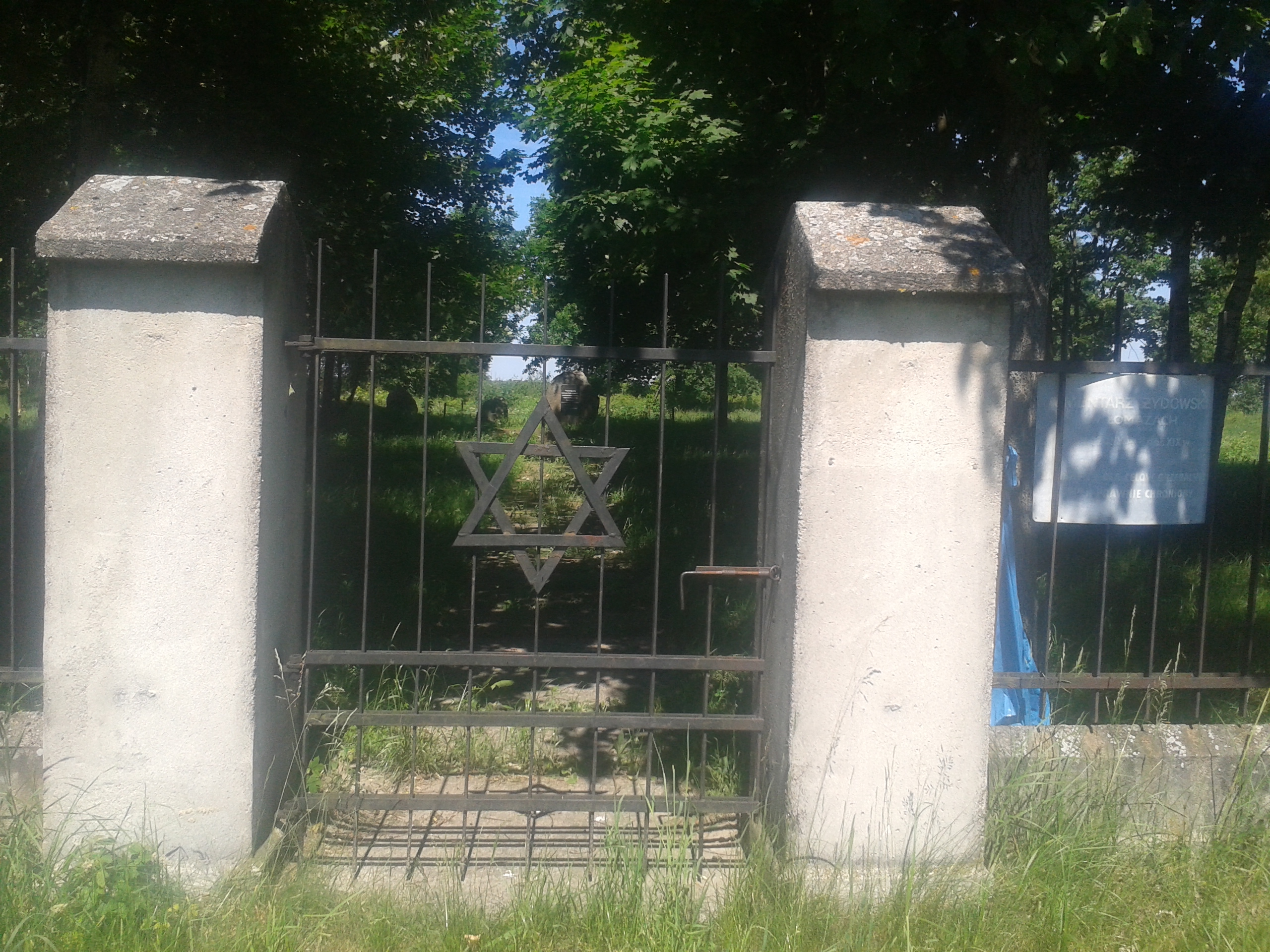 Brama prowadząca na cmentarz żydowski w Łomazach